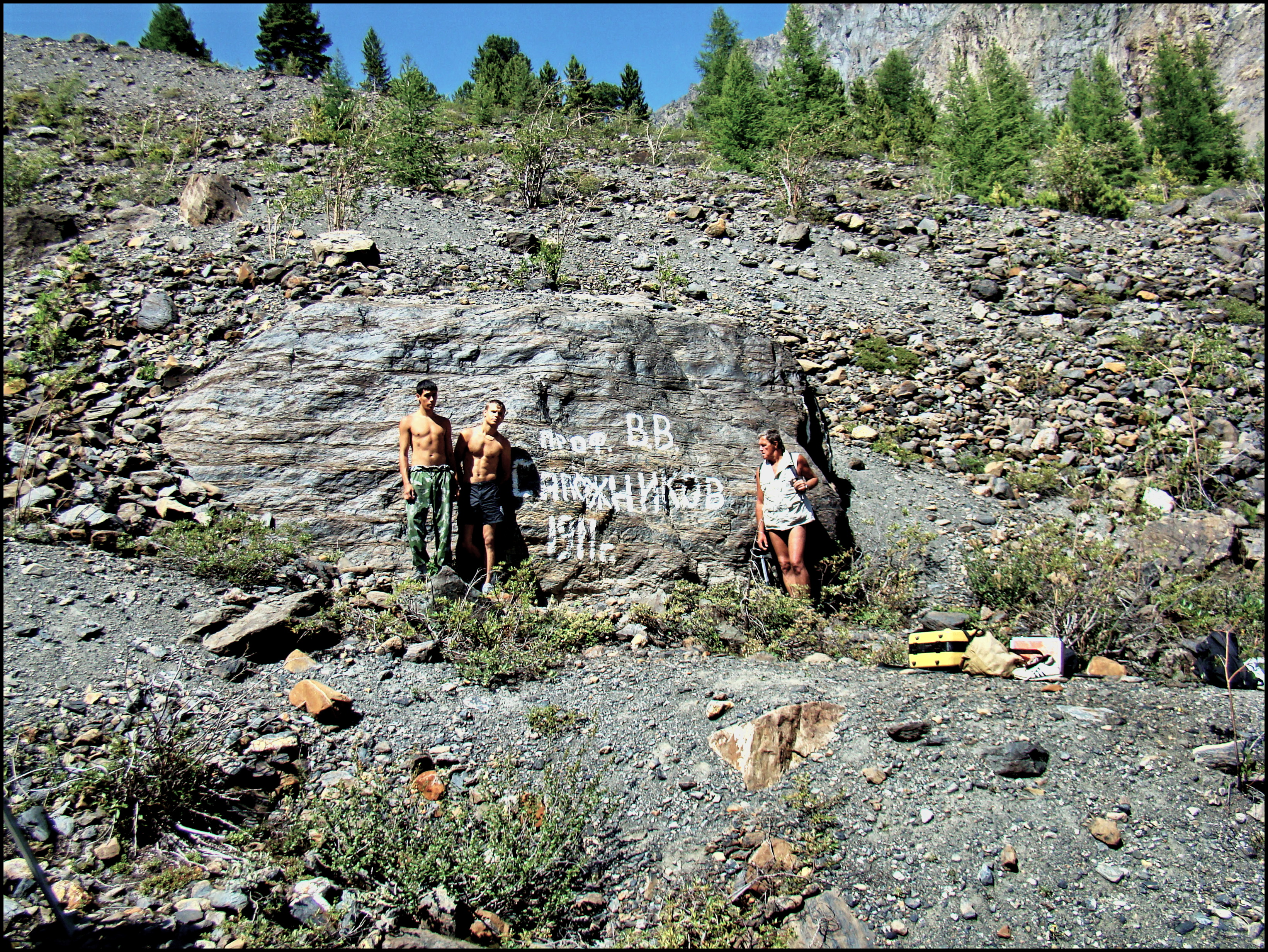 Тур профессора В.В. Сапожникова, установленный в конце ледника Малый Актру в 1911 году